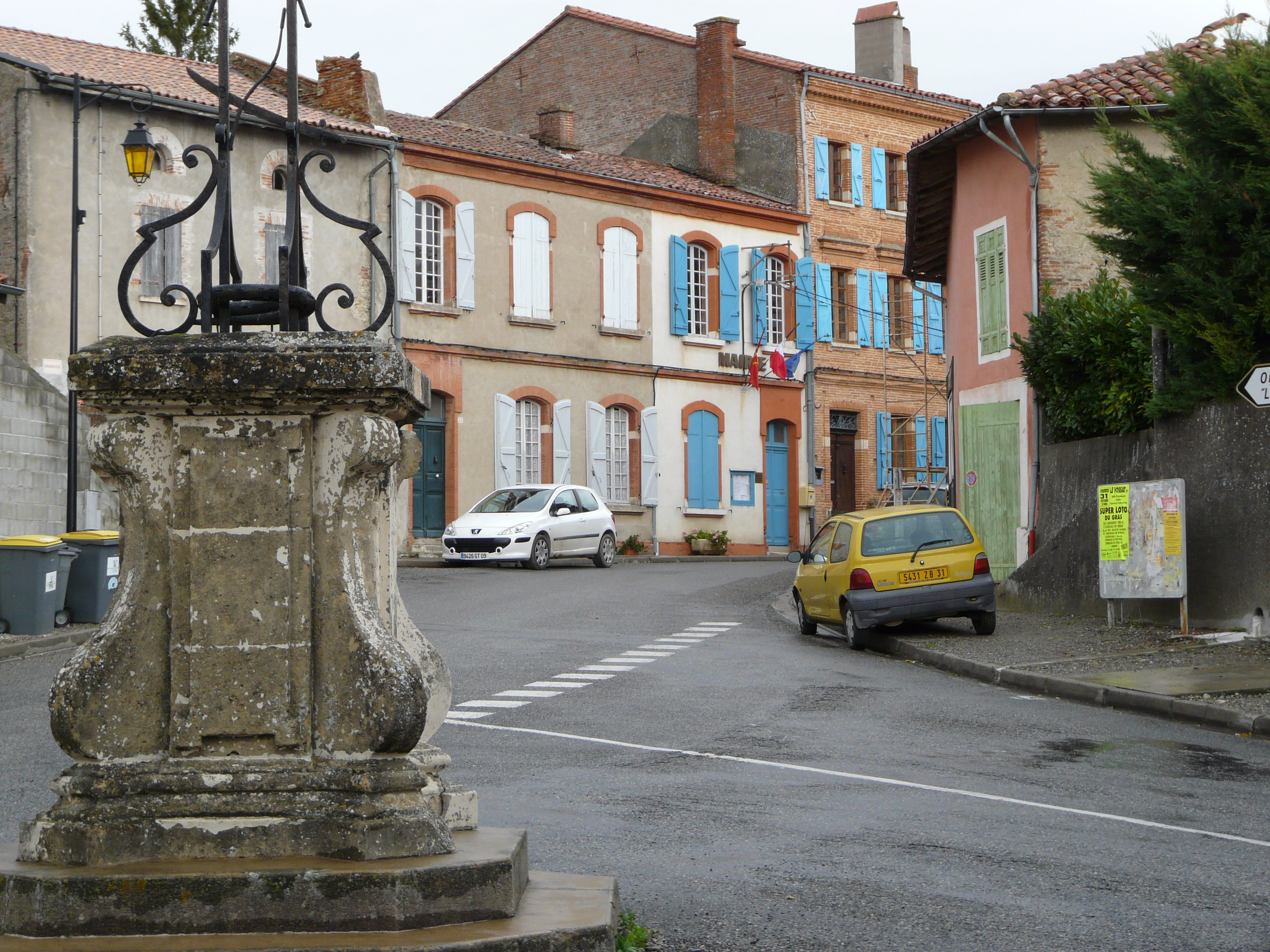 Mairie de Latrape